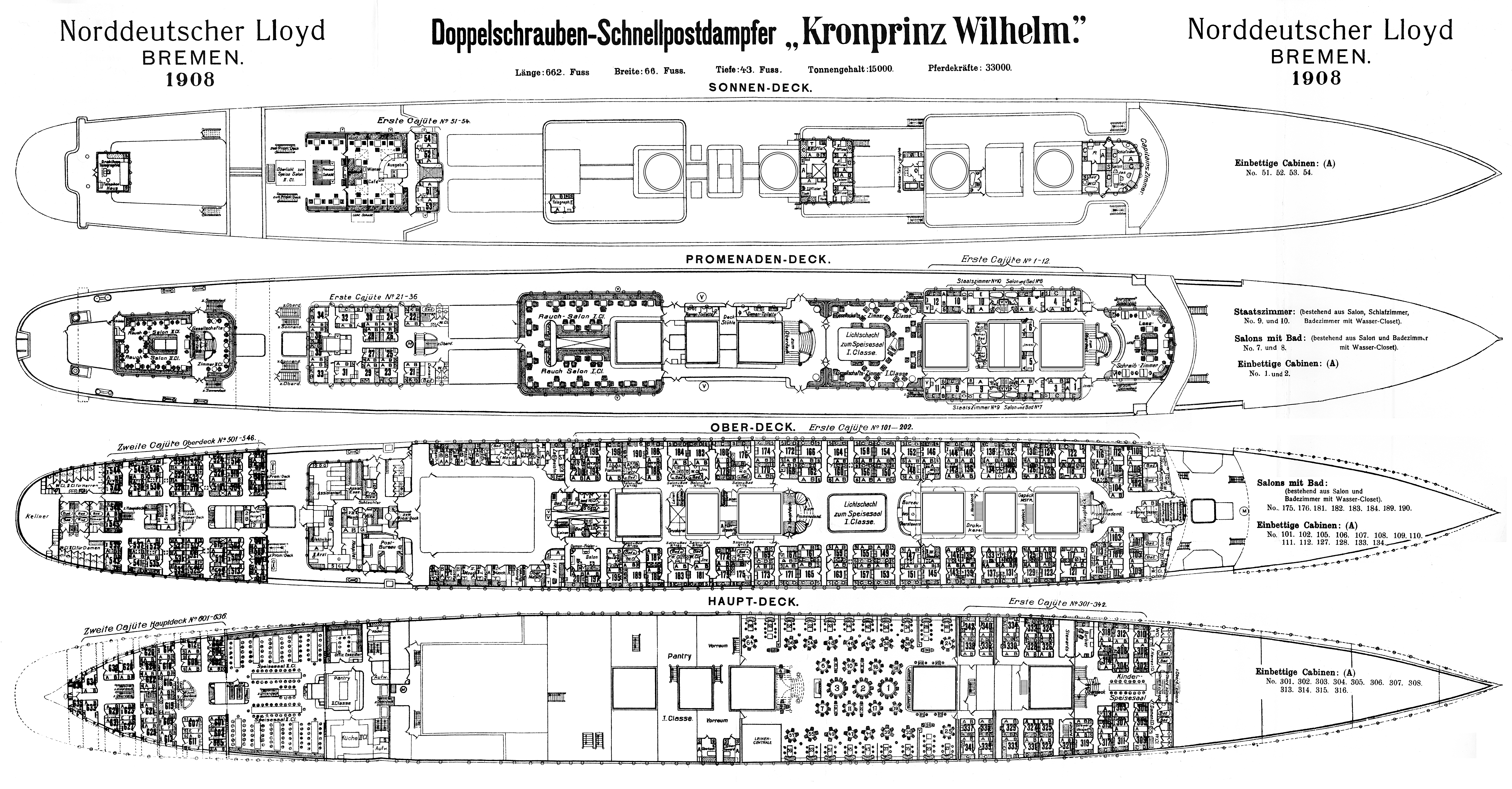 Plan der Passagierdecks I. und II. Klasse auf dem 1901 vom Stapel gelaufenen Atlantik-Schnelldampfer Kronprinz Wilhelm des Norddeutschen Lloyd (NDL). Angefertigt 1908.